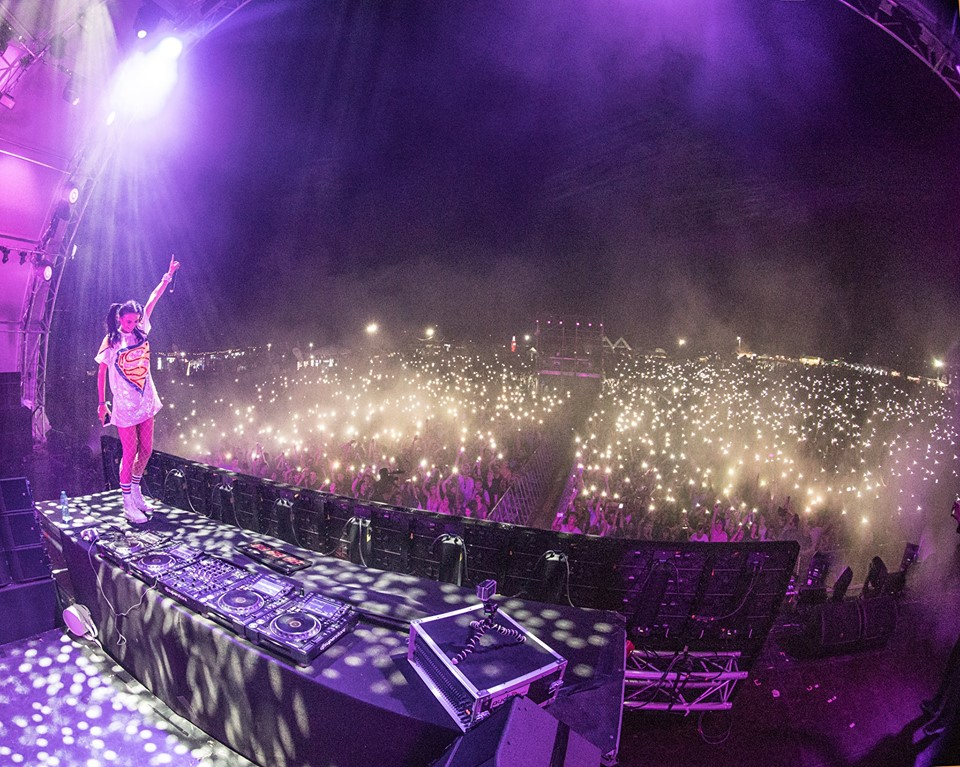 Lights view